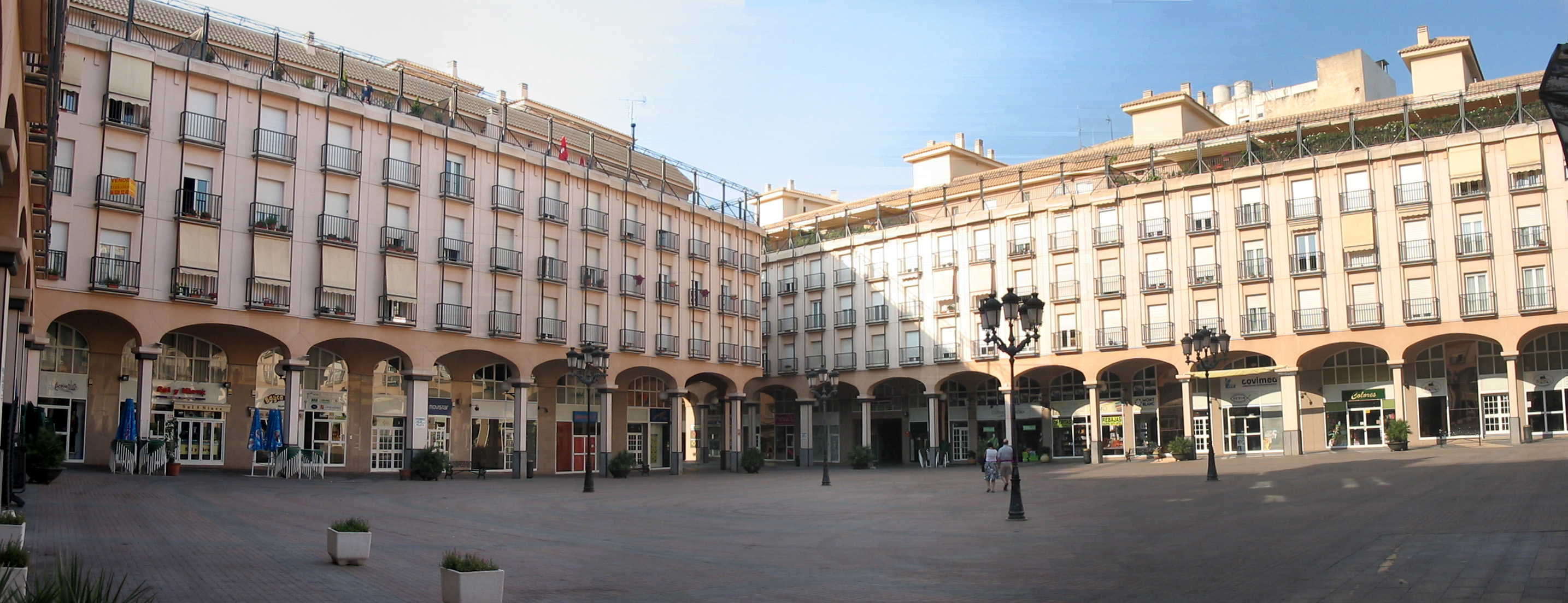 Panorámica de la Plaza Mayor de Elda, Alicante, España.